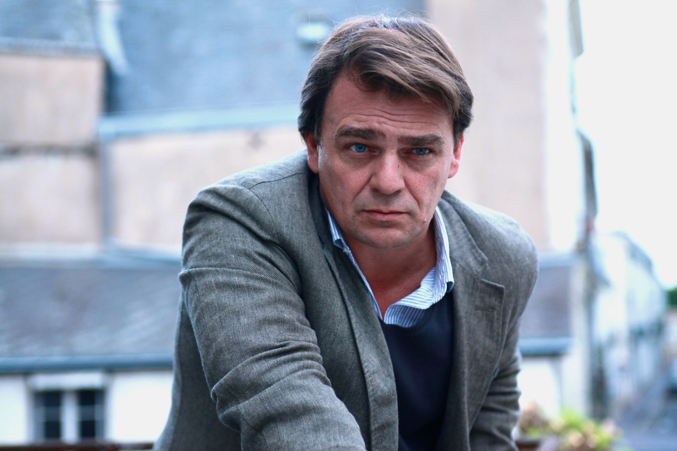 La DIsparition